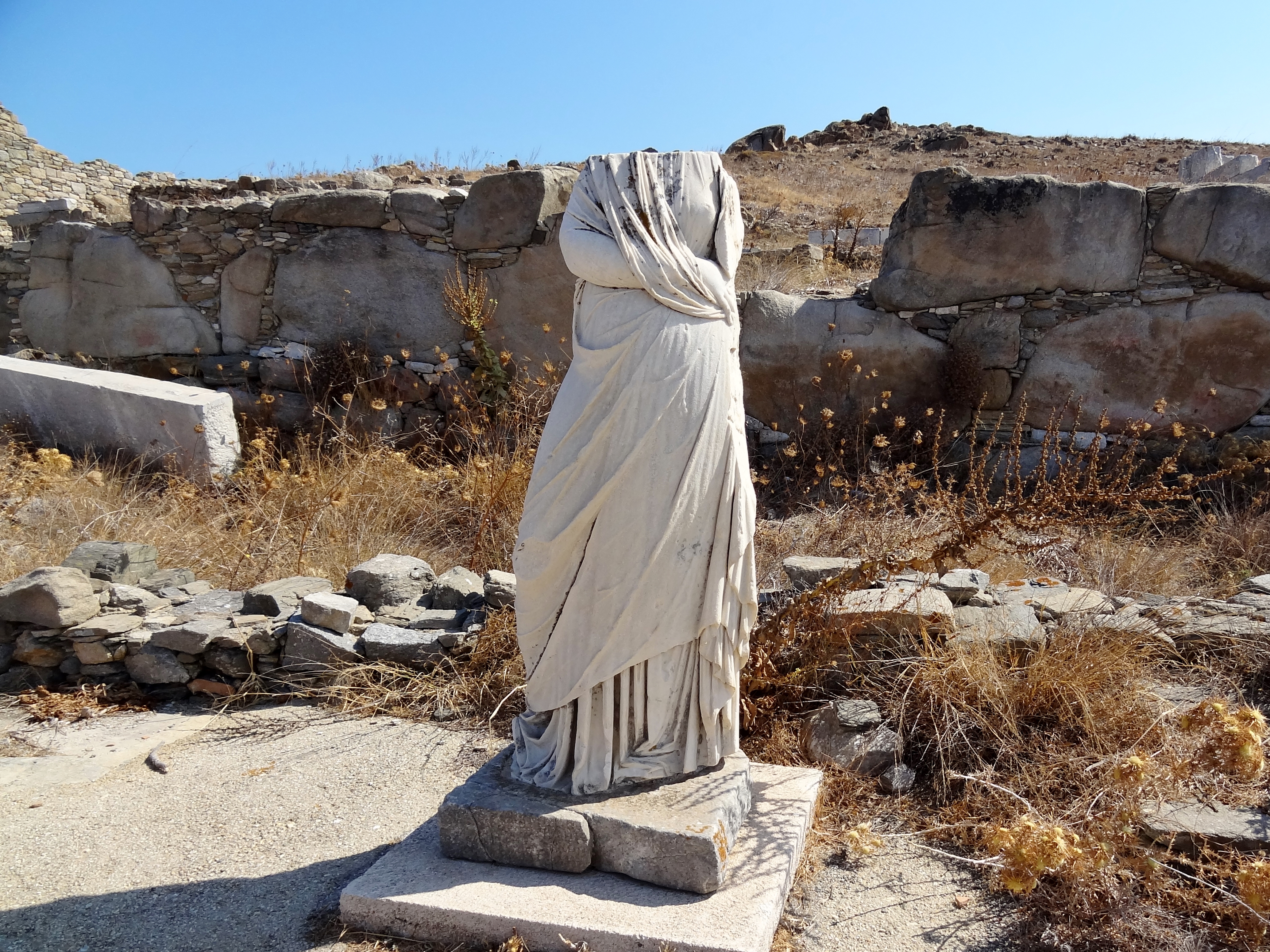 Statue im Serapeion C in der Ausgrabungsstätte von Delos, Kykladen, Griechenland